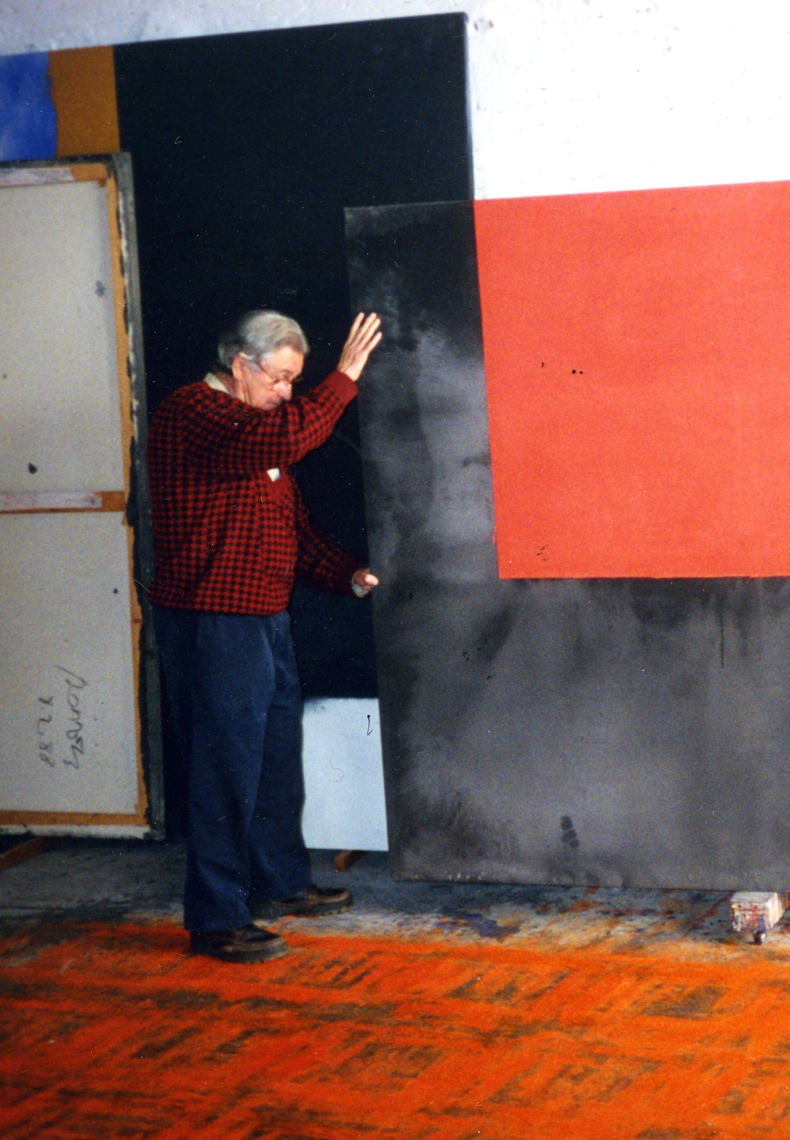 Le peintre catalan Alfons Borrell i Palazón dans son atelier, vers 1998